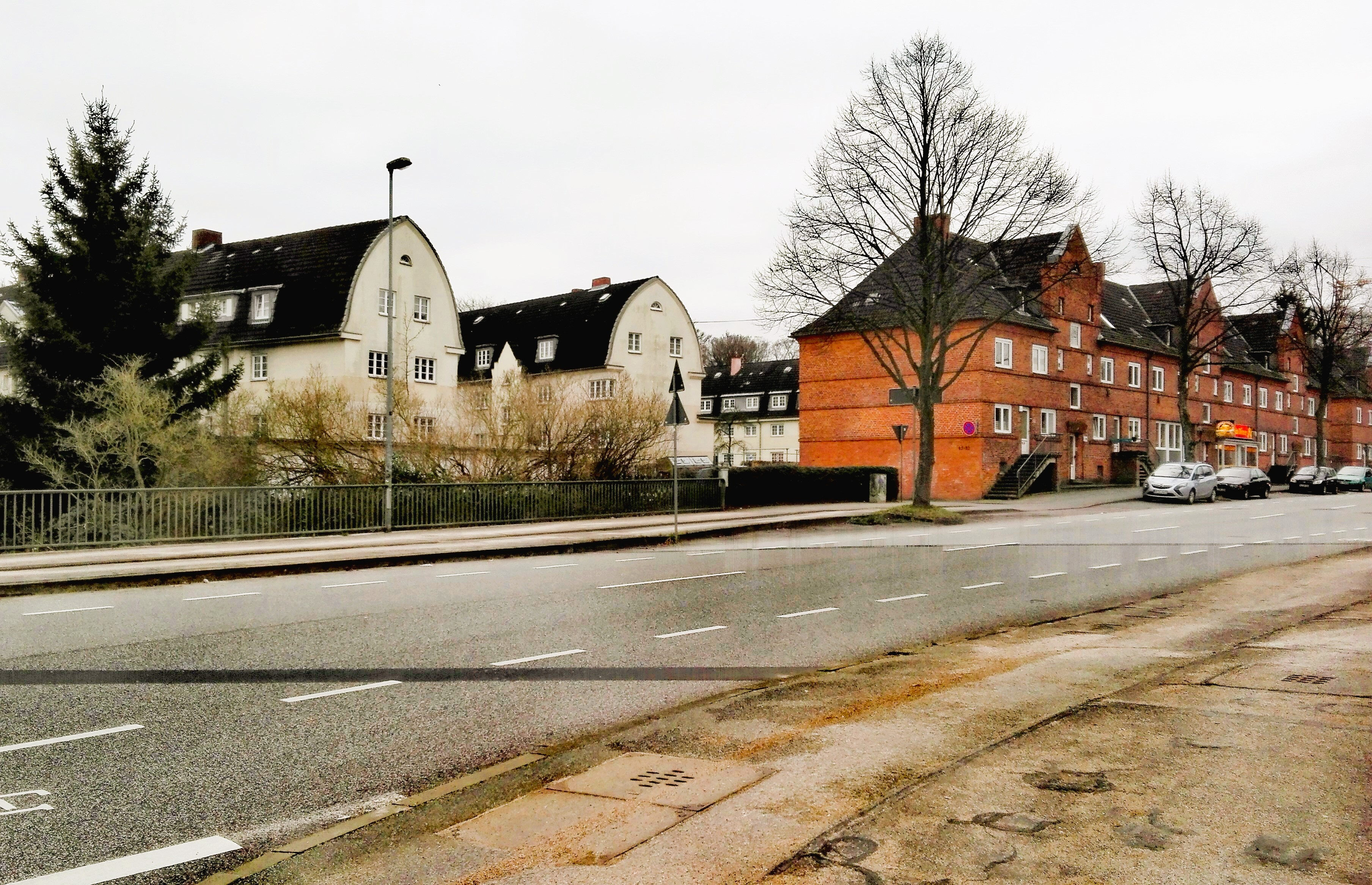 Anfang ds Ersten Weltkrieges eröffnete Arbeitersiedlung der Schiffswerft von Henry Koch in der Luisenstraße. Ihr Architekt war Rissom. Rissom war Teilhaber der Lübeckischen Anzeigen. Er fiel als Hauptmann im IR 163.